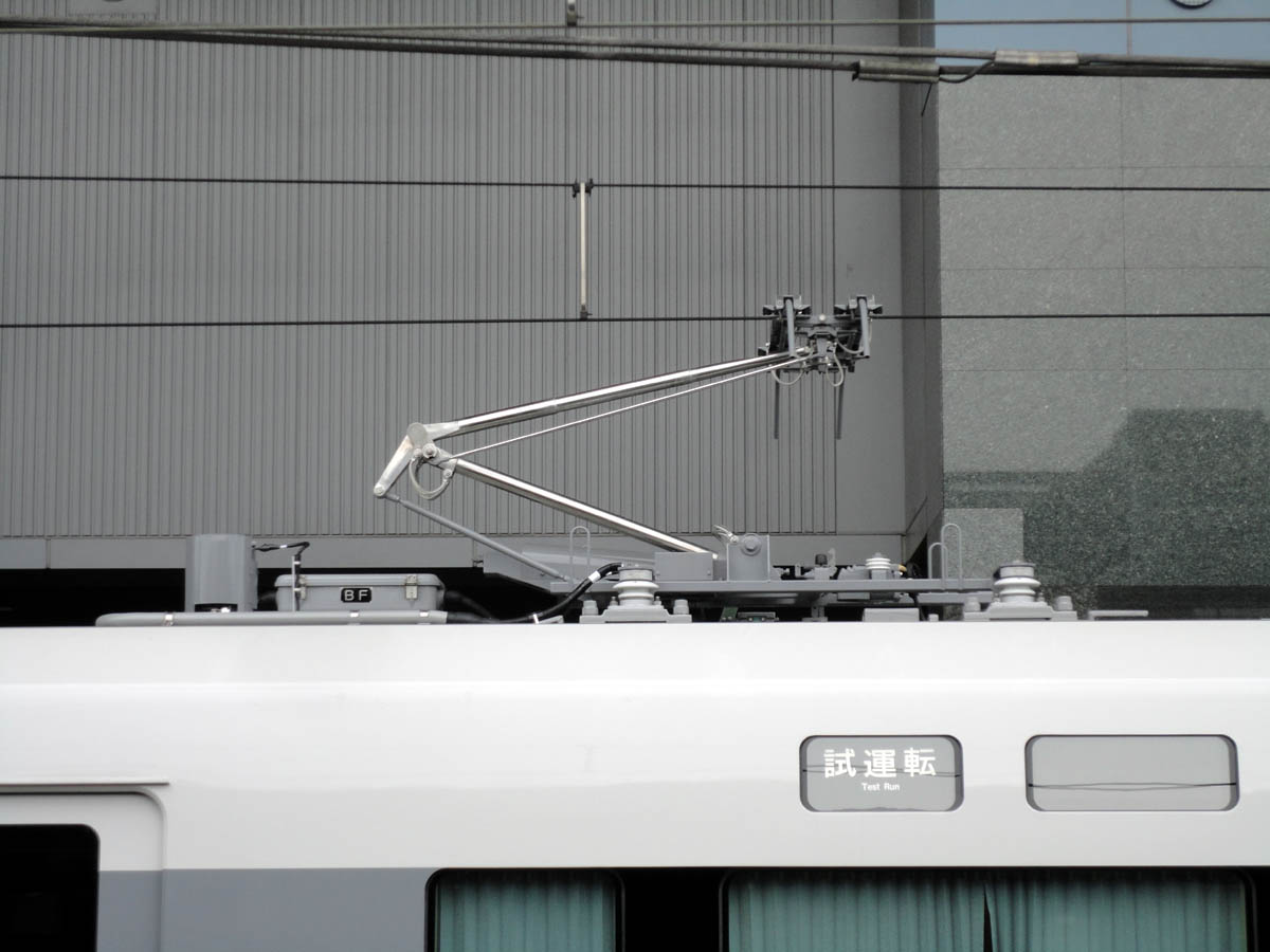 JR西日本287系パンタグラフ